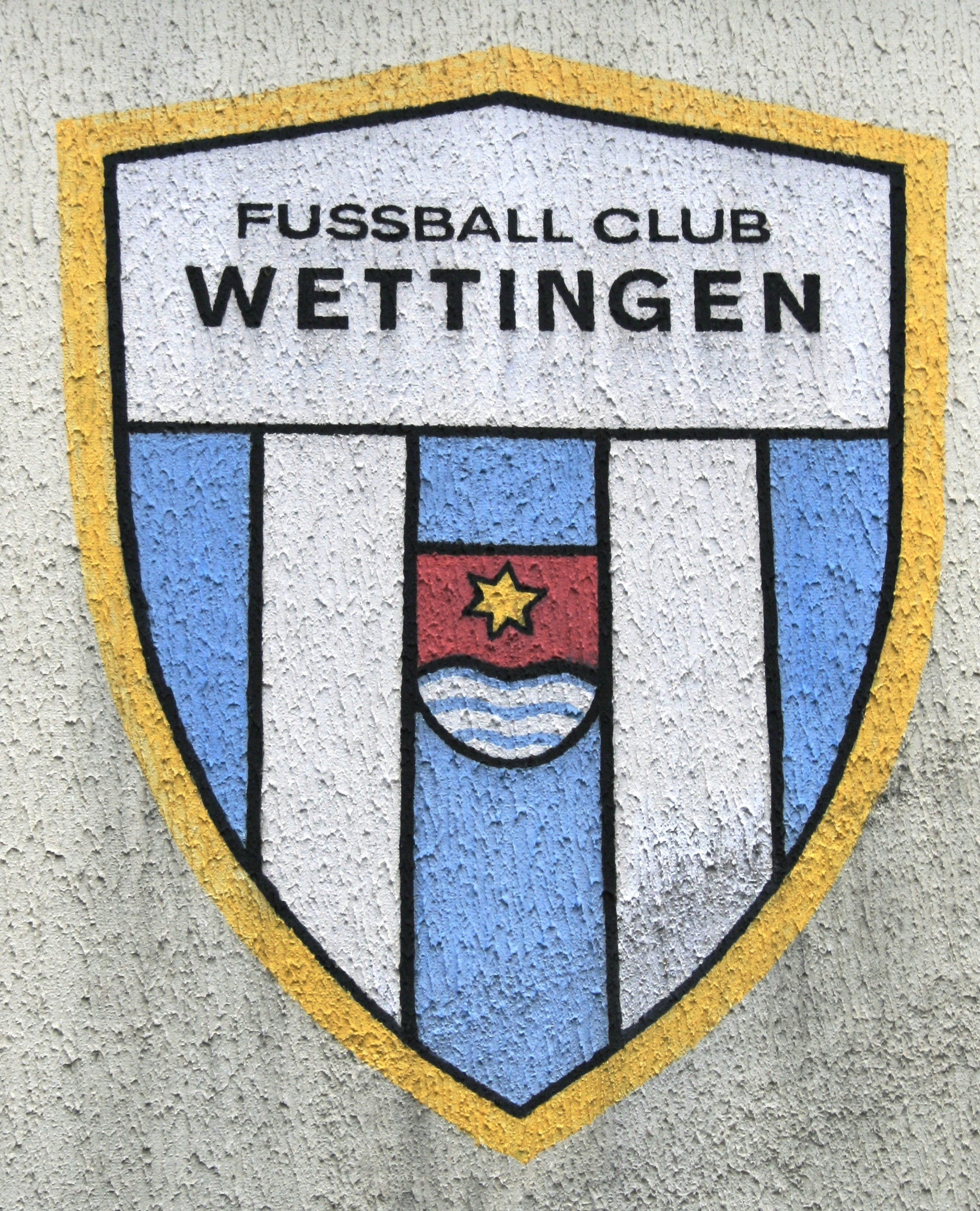 Das ehemalige Logo des FC Wettingen am Stadion Altenburg, Wettingen, Schweiz